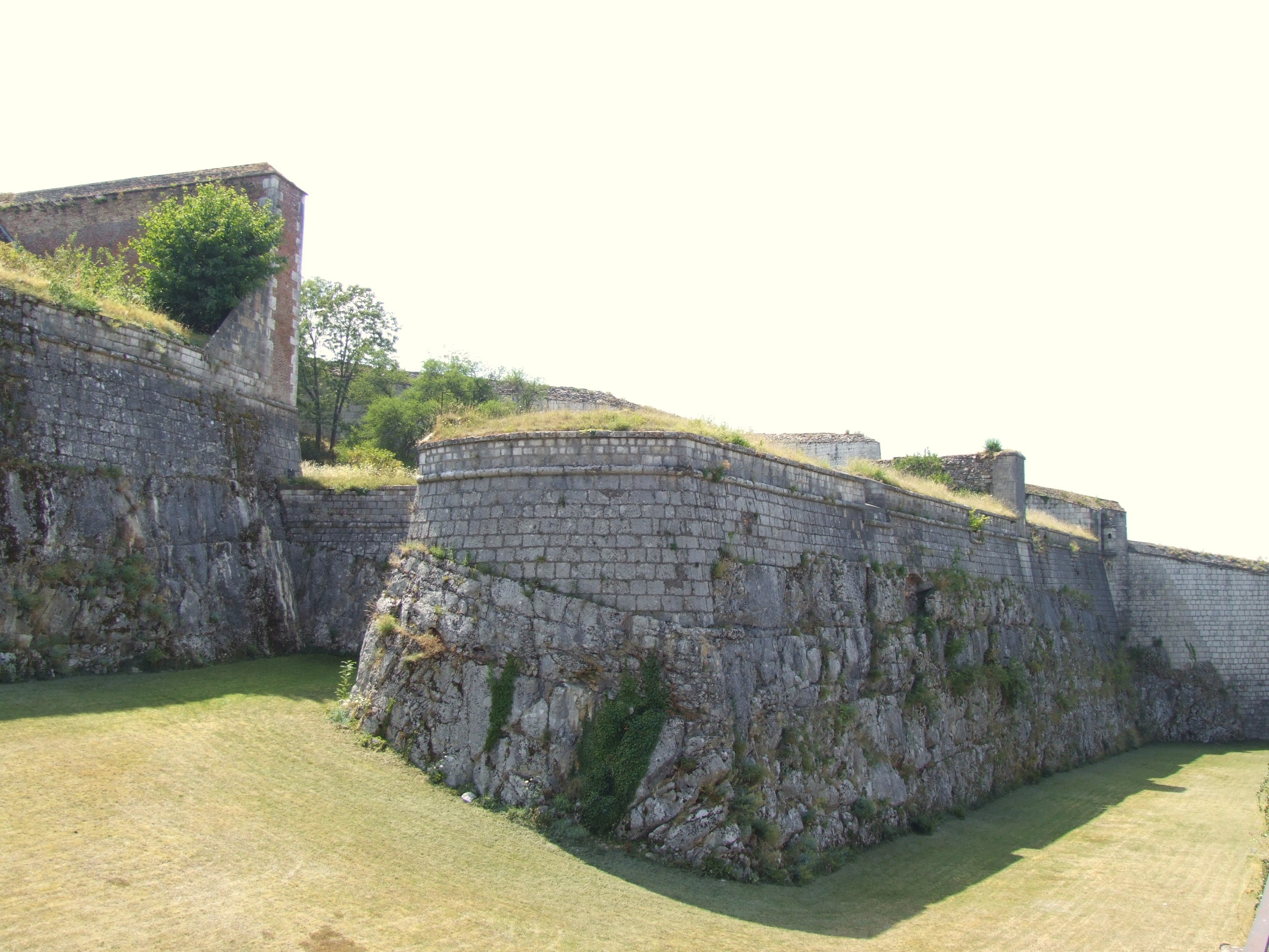 Citadelle de Besançon - Front Saint-Etienne - Orillon